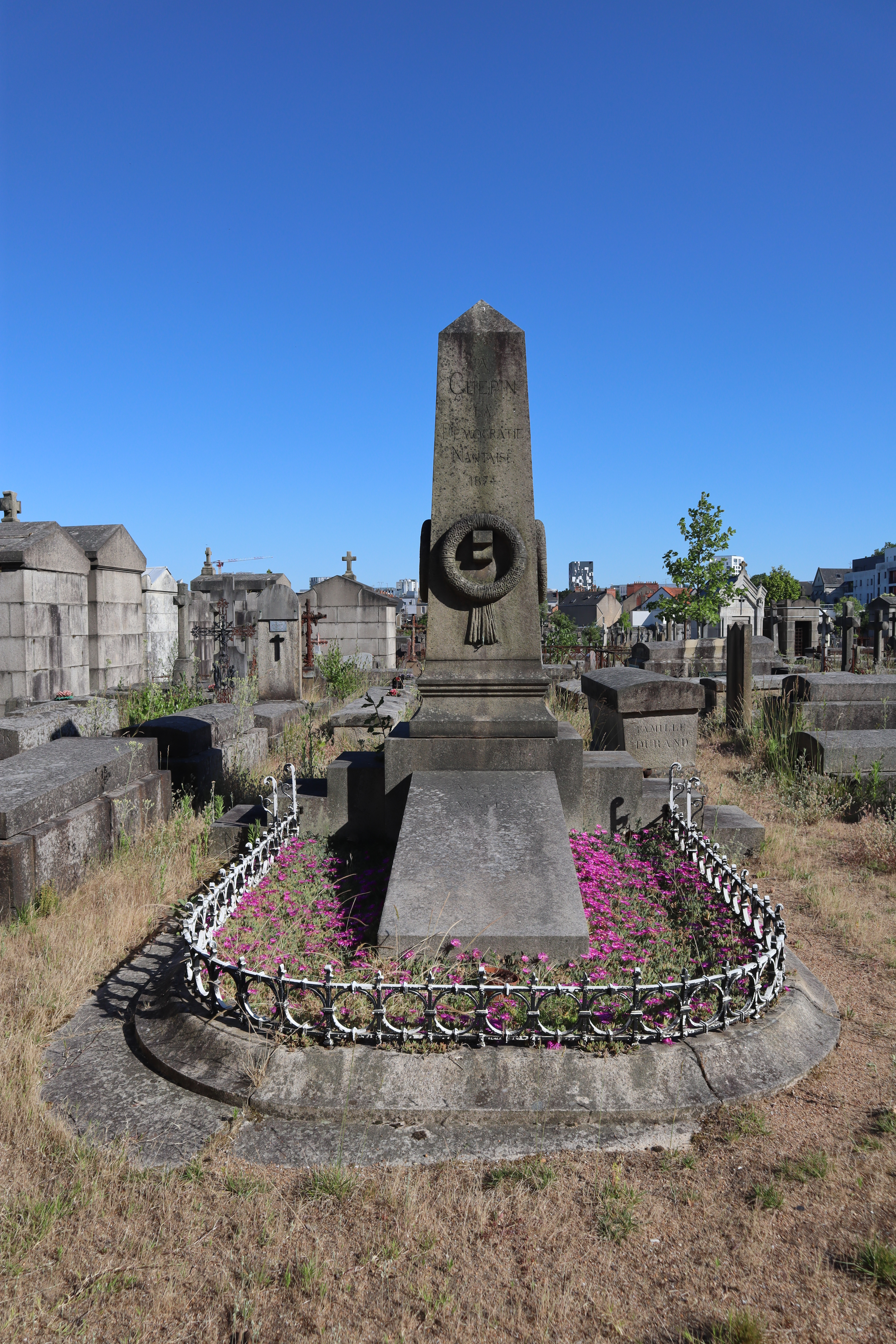 Tombe d'Ange Guépin au Cimetière La Bouteillerie à Nantes (44).